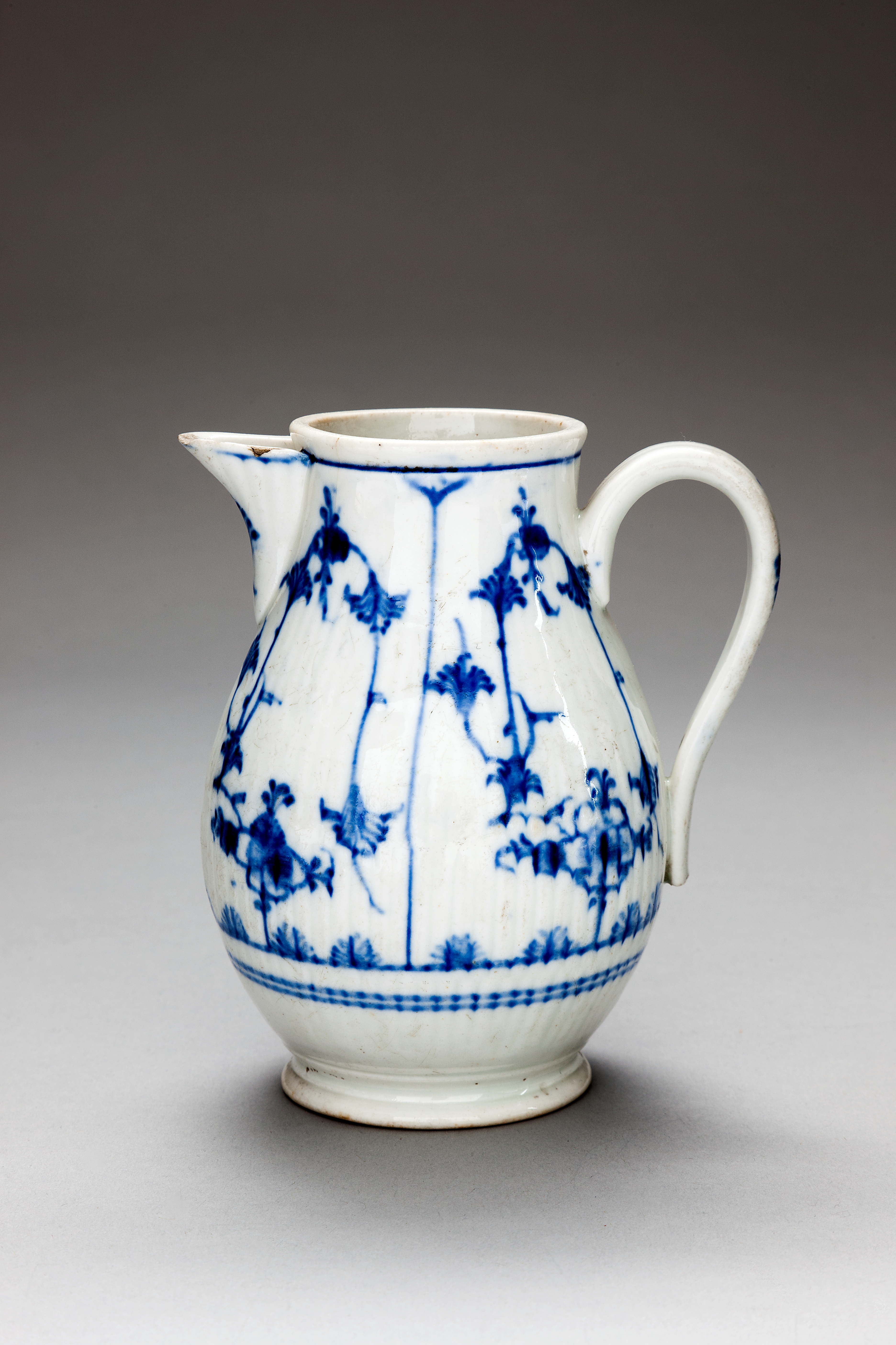 Päronformig, kanna (lock saknas) med stiliserad växtornamentering i blått under glasyren Fabriken grundlagd 1777 av Christian Gräbner. Fabriken kom sedan 1782 under hertig Karl Augusts av Weimar förvaltning och arrenderades 1788 av Gotthelf Greiner. Pris: 5 Mk. Se Rescontra Walther v.H, Uhses reseant. 27 maj 1896.